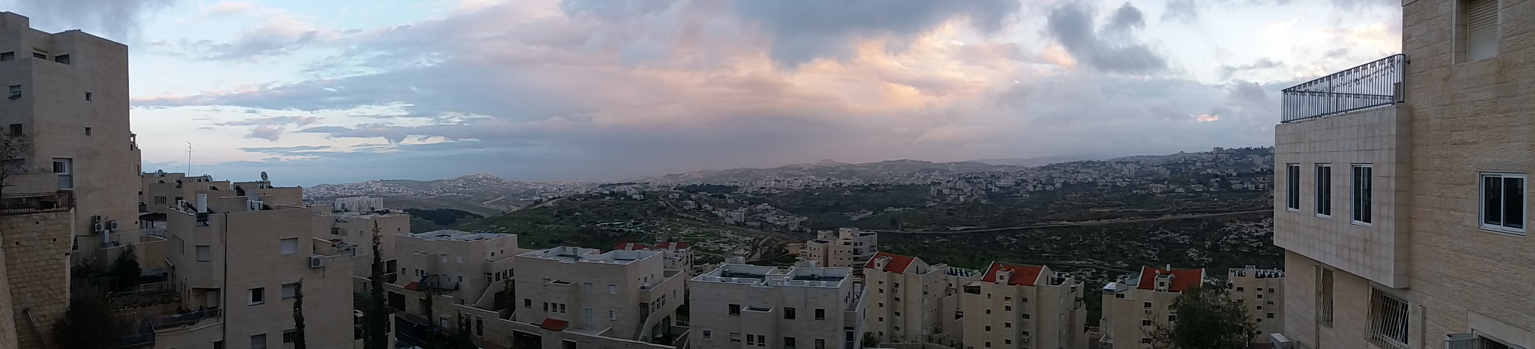 הנוף הדרומי של הר חומה לכיוון בית לחם. במרכז התמונה - הרודיון. התמונה צולמה מרחוב שלמה באום.